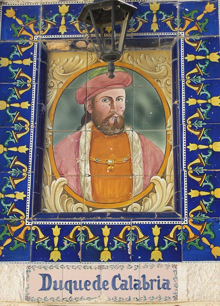 Detalle de la fuente del Duque de Calabria - Viver, Alto Palancia (Castellón)